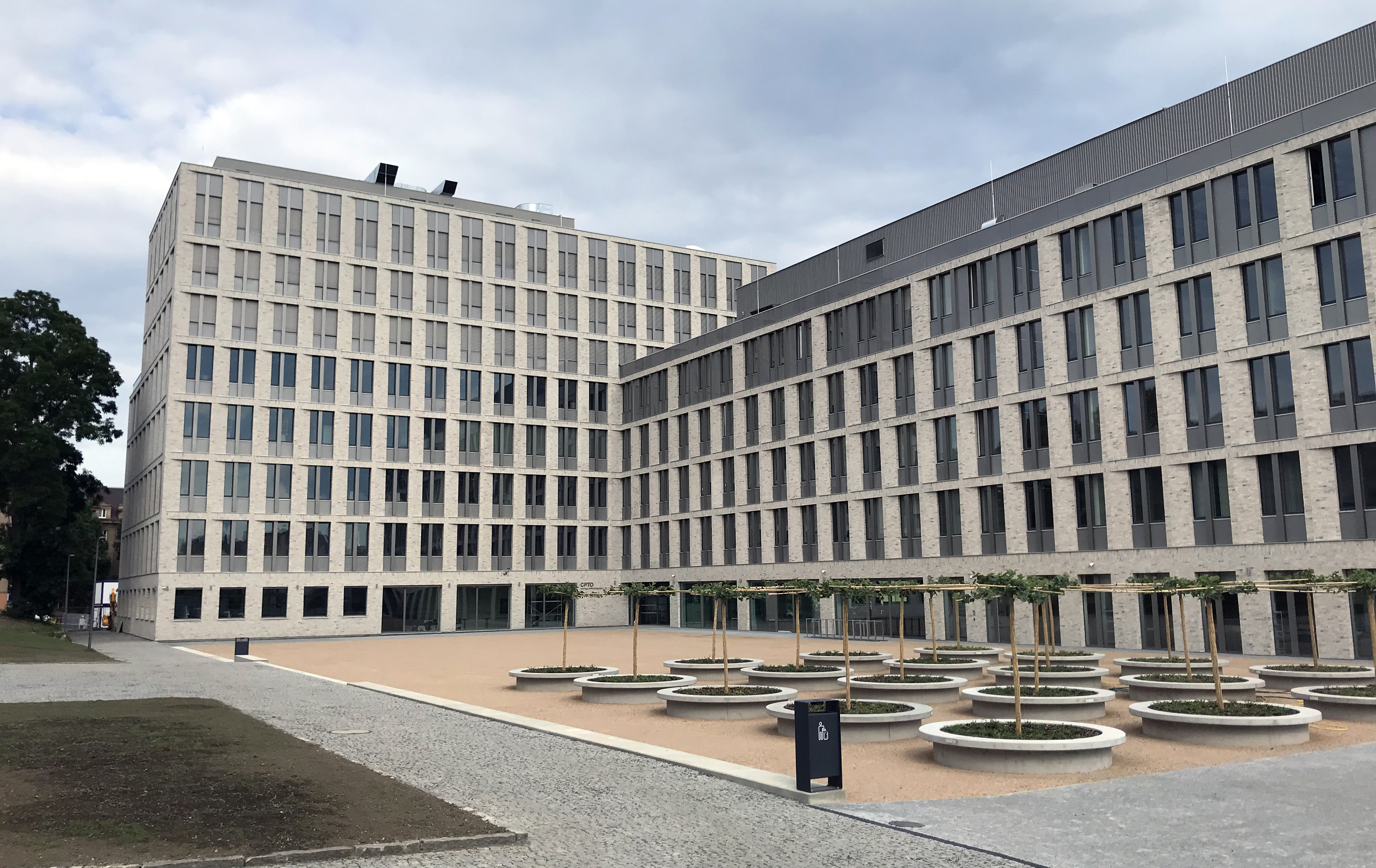 Pohled na novou budovu Centra přírodovědných a technických oborů (červen 2020), v němž má sídlo Přírodovědecká fakulta a Fakulta životního prostředí, a menza UJEP v Ústí nad Labem.